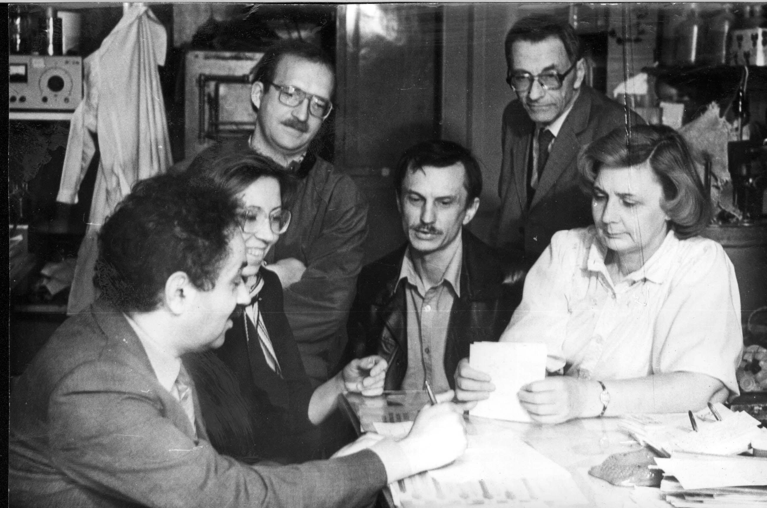 Писаревский Александр Моисеевич в ЛГУ